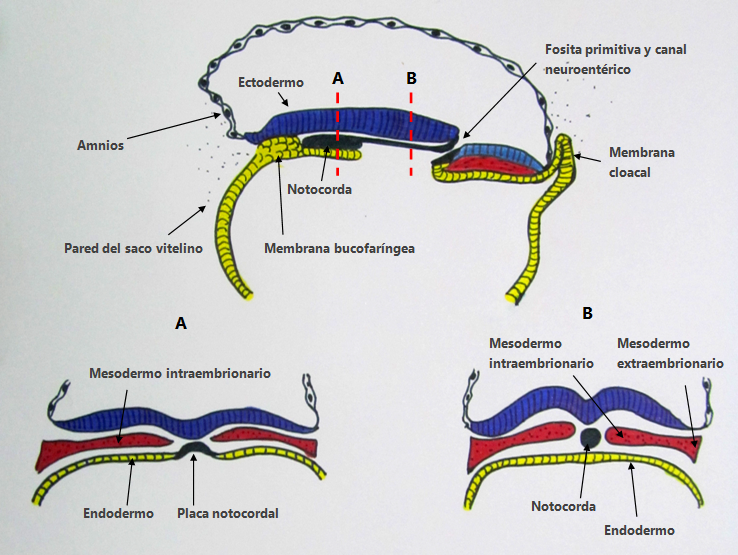 Se observa en A y B cortes sagitales de un embrión, correspondientes al lado craneal y caudal (OJO QUE LA FIGURA A CORRESPONDE AL CORTE B Y VICEVERSA!, Además las flechas del amnios y pared del salco vitelino están desplazadas hacia la izquierda).